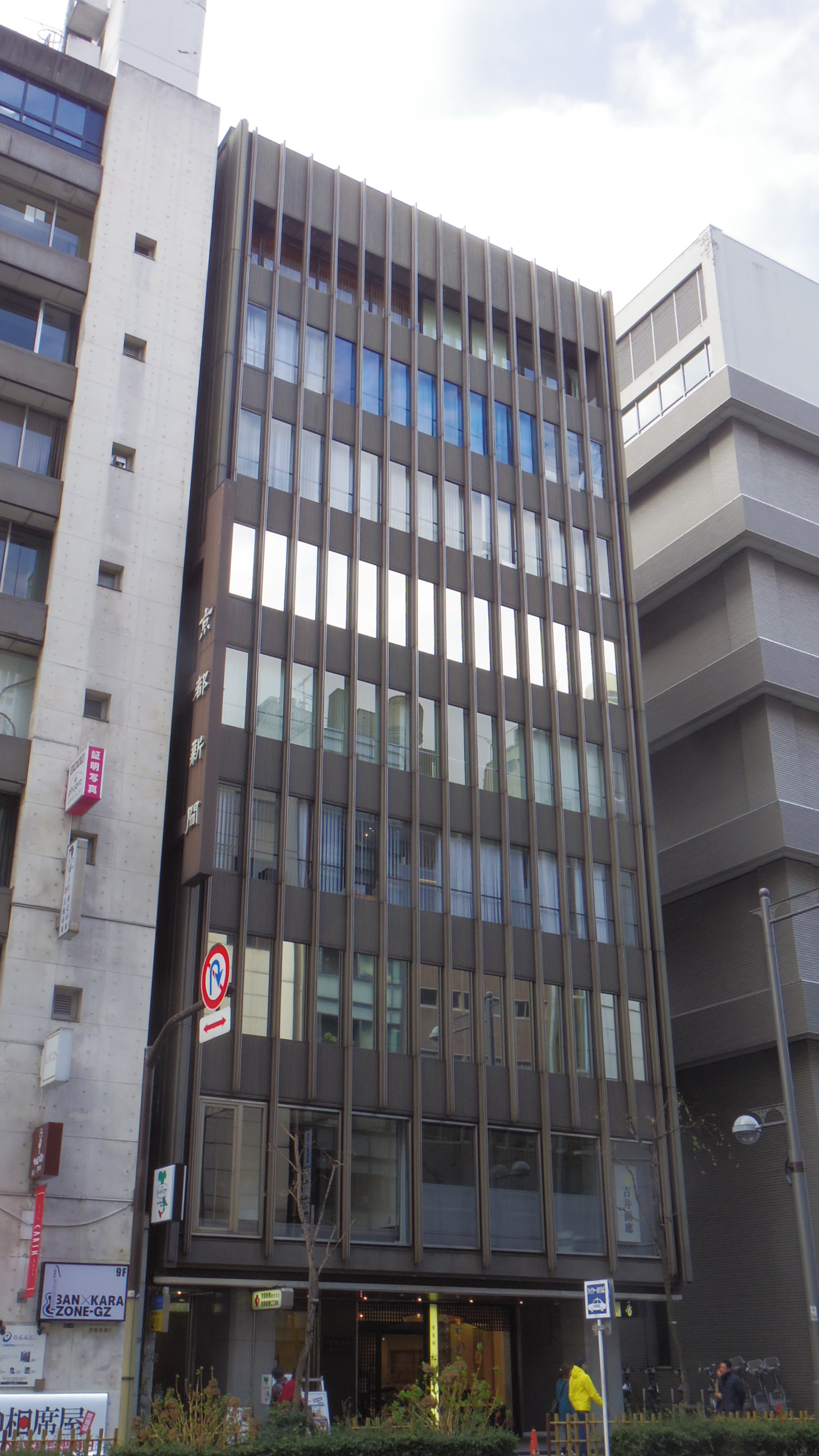 京都新聞社東京支社（中央区銀座）。